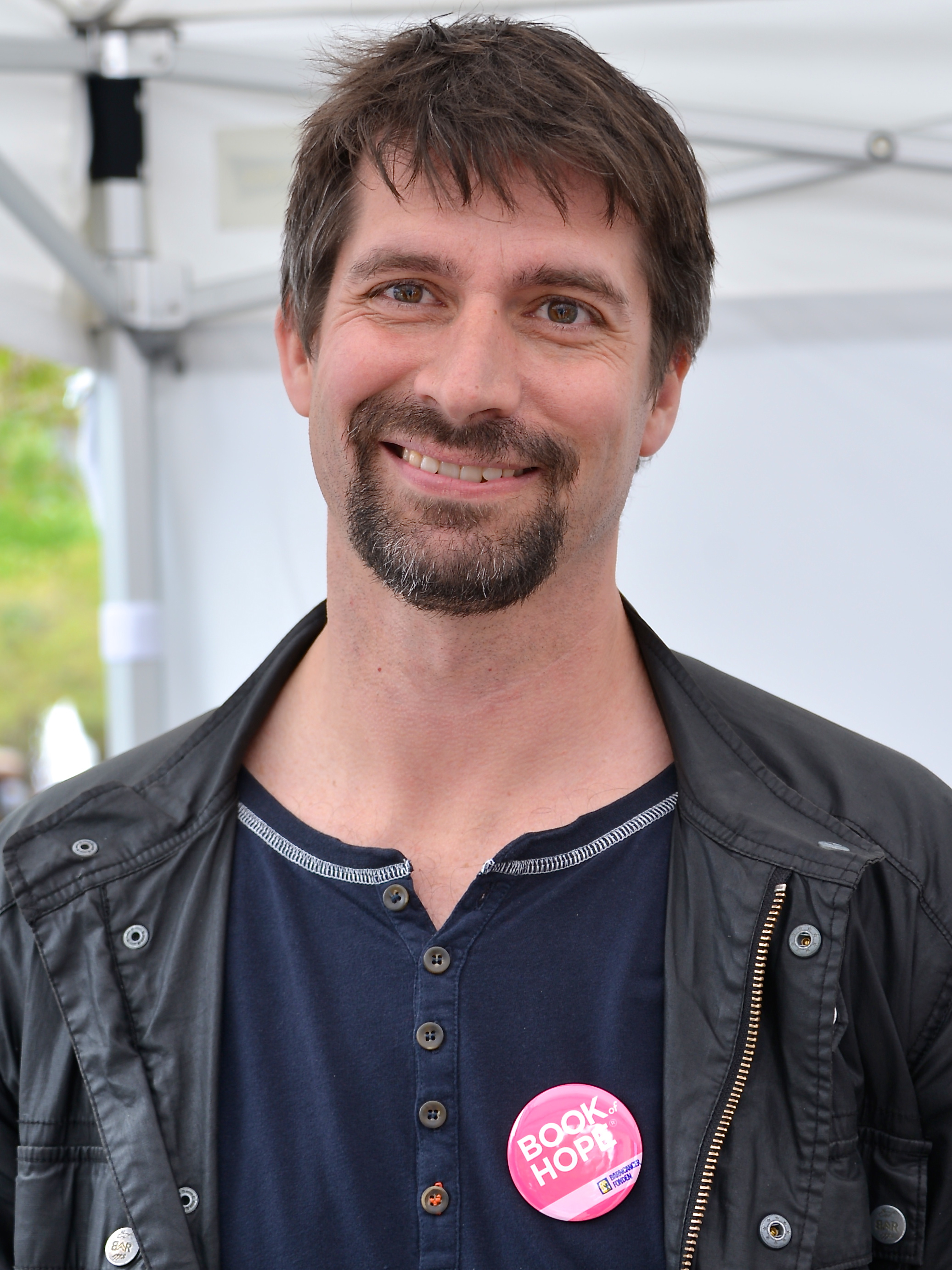 Lars Rambe i Kungsträdgården i Stockholm den 22 maj 2013 i samband med en kampanj för Barncancerfonden.